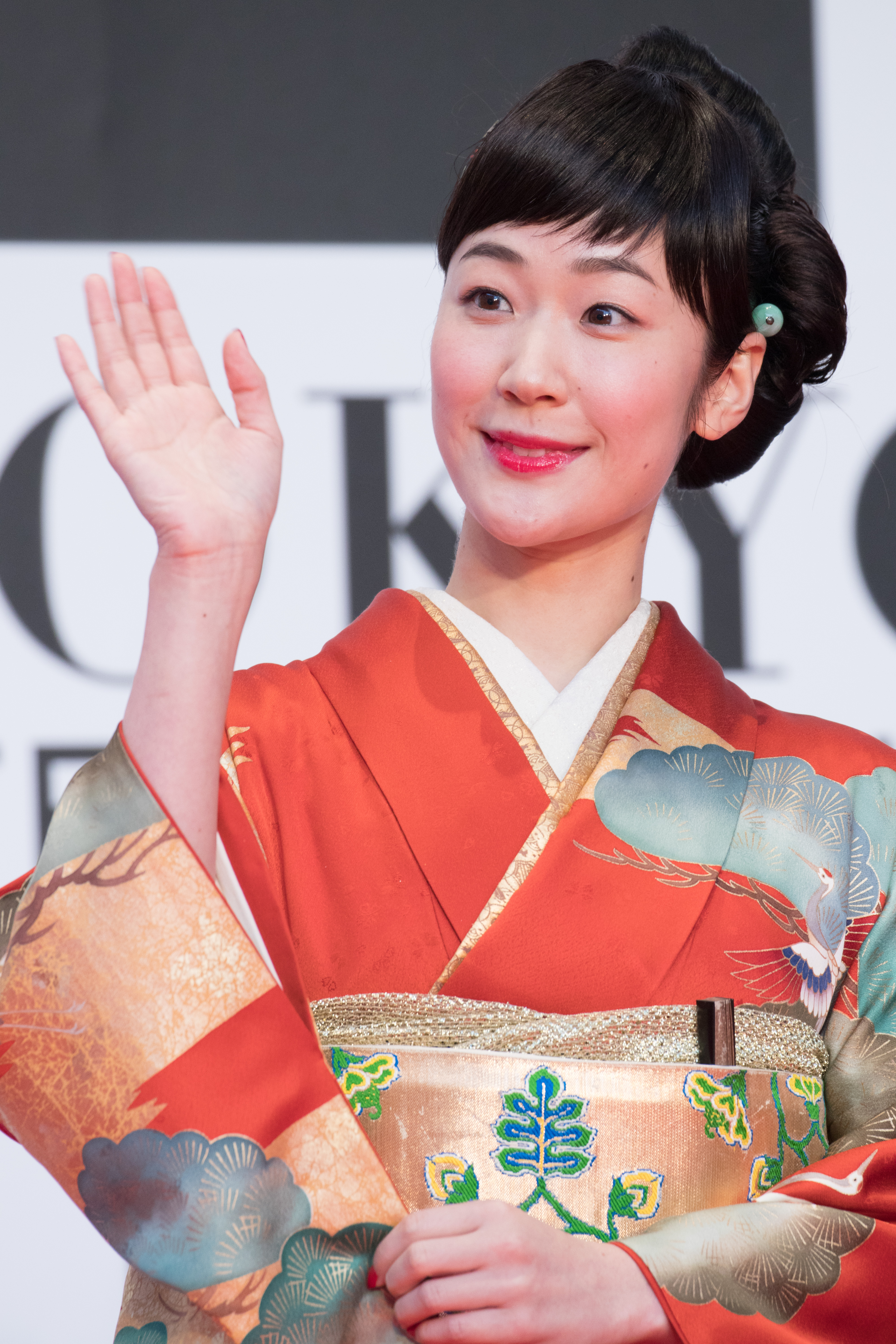 第29回 東京国際映画祭 オープニングセレモニー 黒木華